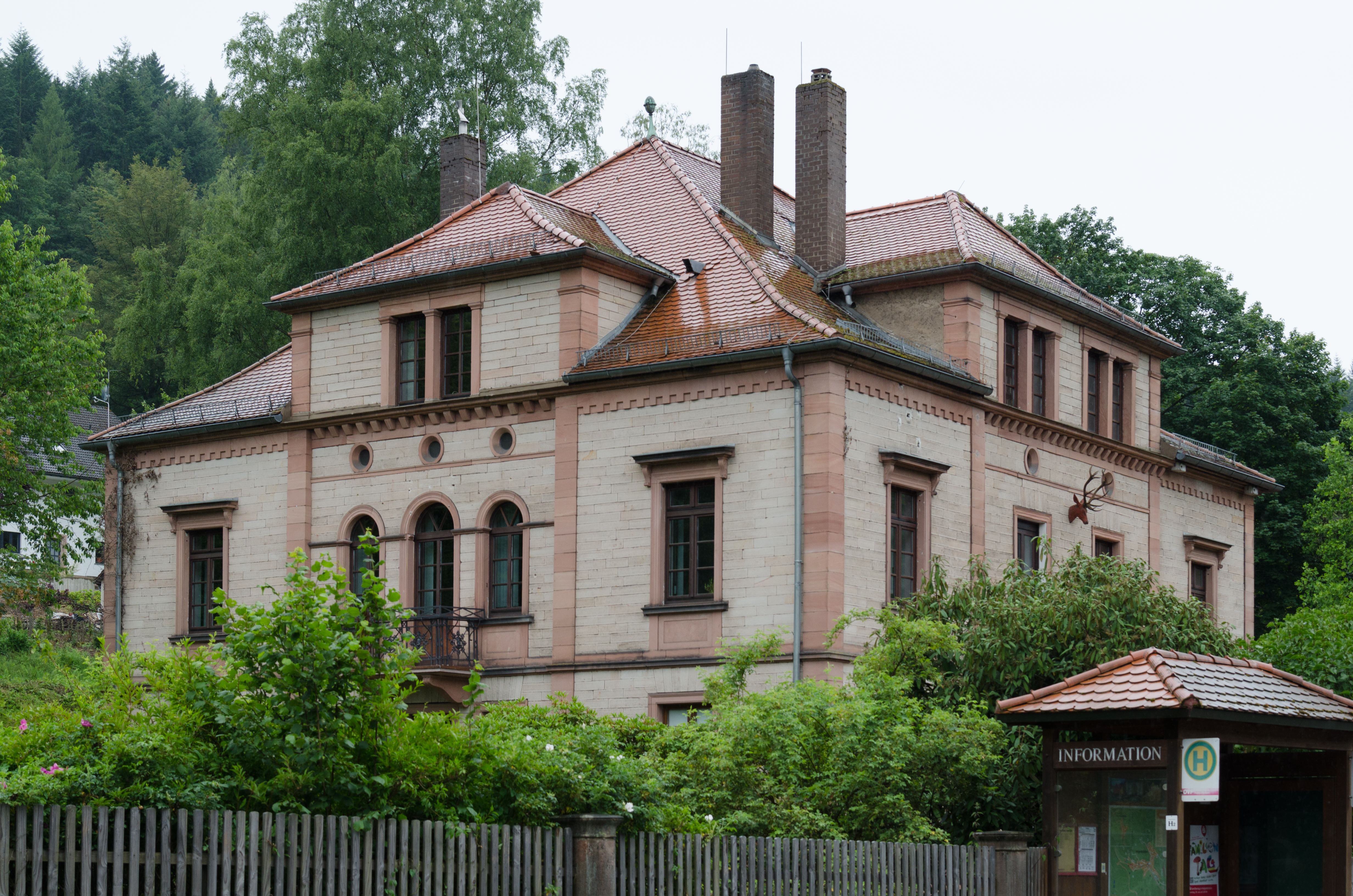 Heigenbrücken, Lindenallee 31